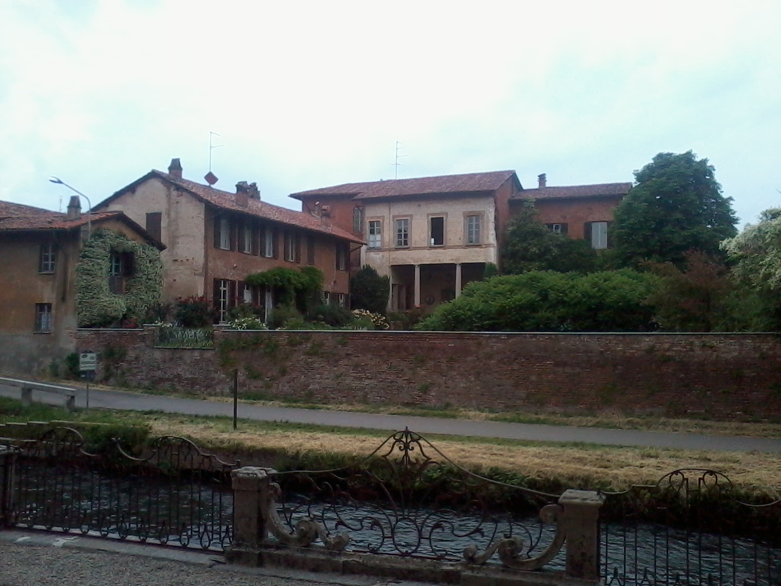 Villa Dugnani Cittadini a Robecco sul Naviglio (MI) - Italia